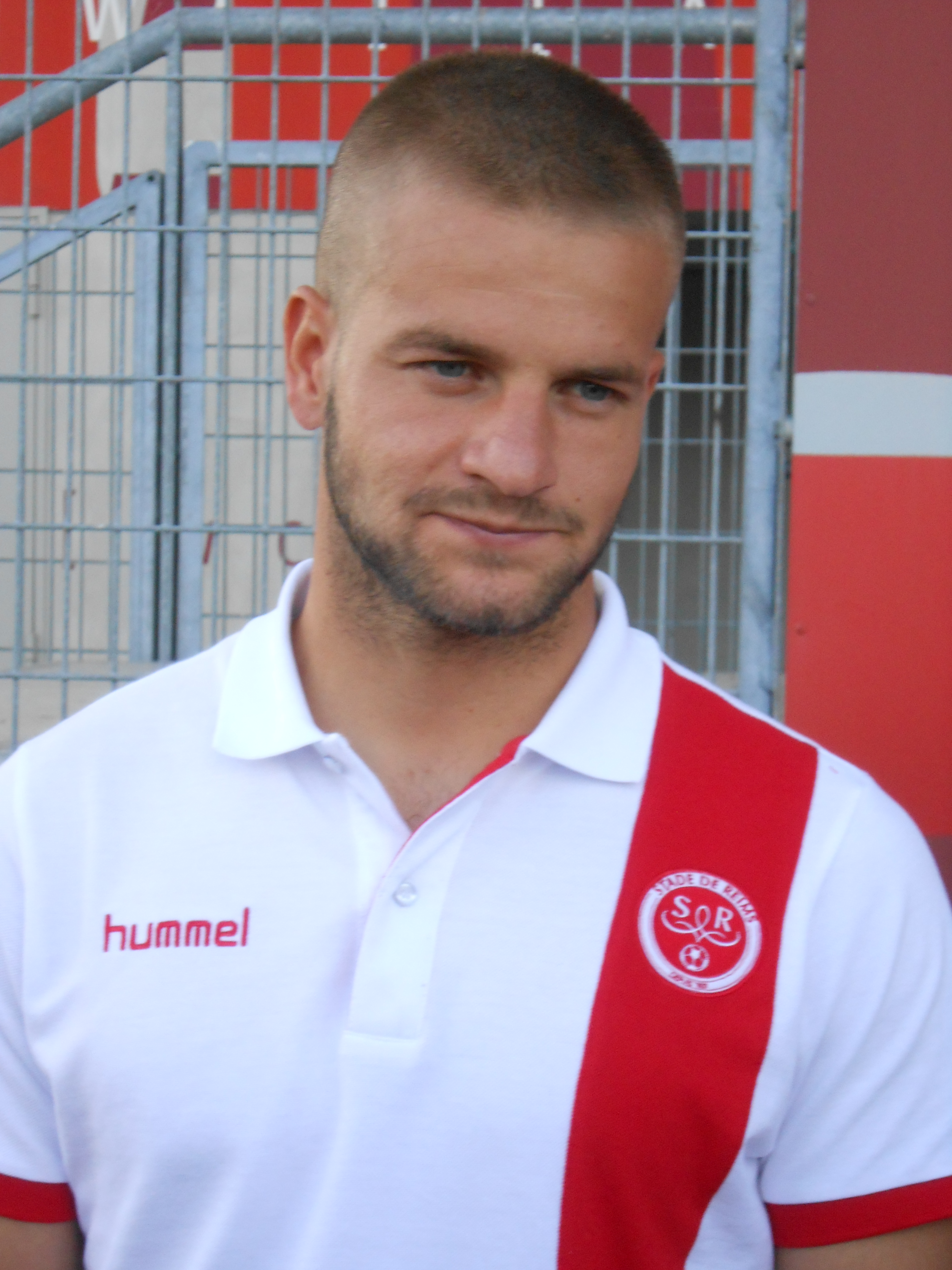 Atila Turan lors de la journée des abonnés à Reims en 2015.